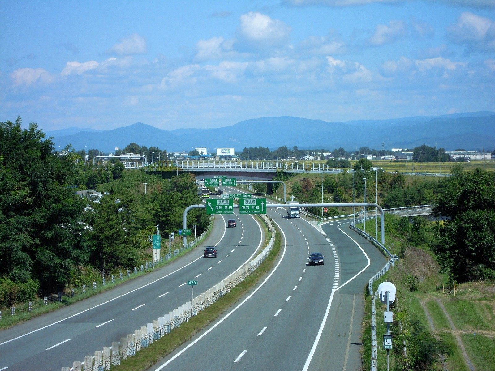 岩手県花巻市にある東北自動車道の花巻ジャンクションを仙台方面から盛岡方面に向けて。本線上空を左右に横切っている跨道橋は、釜石道とのC・Dランプ橋で、向かって右が釜石方面。